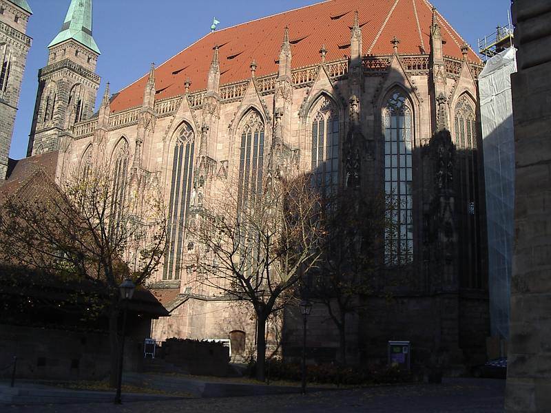 Nürnberg, St. Sebald, Ostchor, (Nov. 2003); von SO. / Der Ostchor entstammt der Parlerzeit (gegen Ende des 14. Jh.); mehrfach restauriert, die Dachgalerie ist komplett neu.